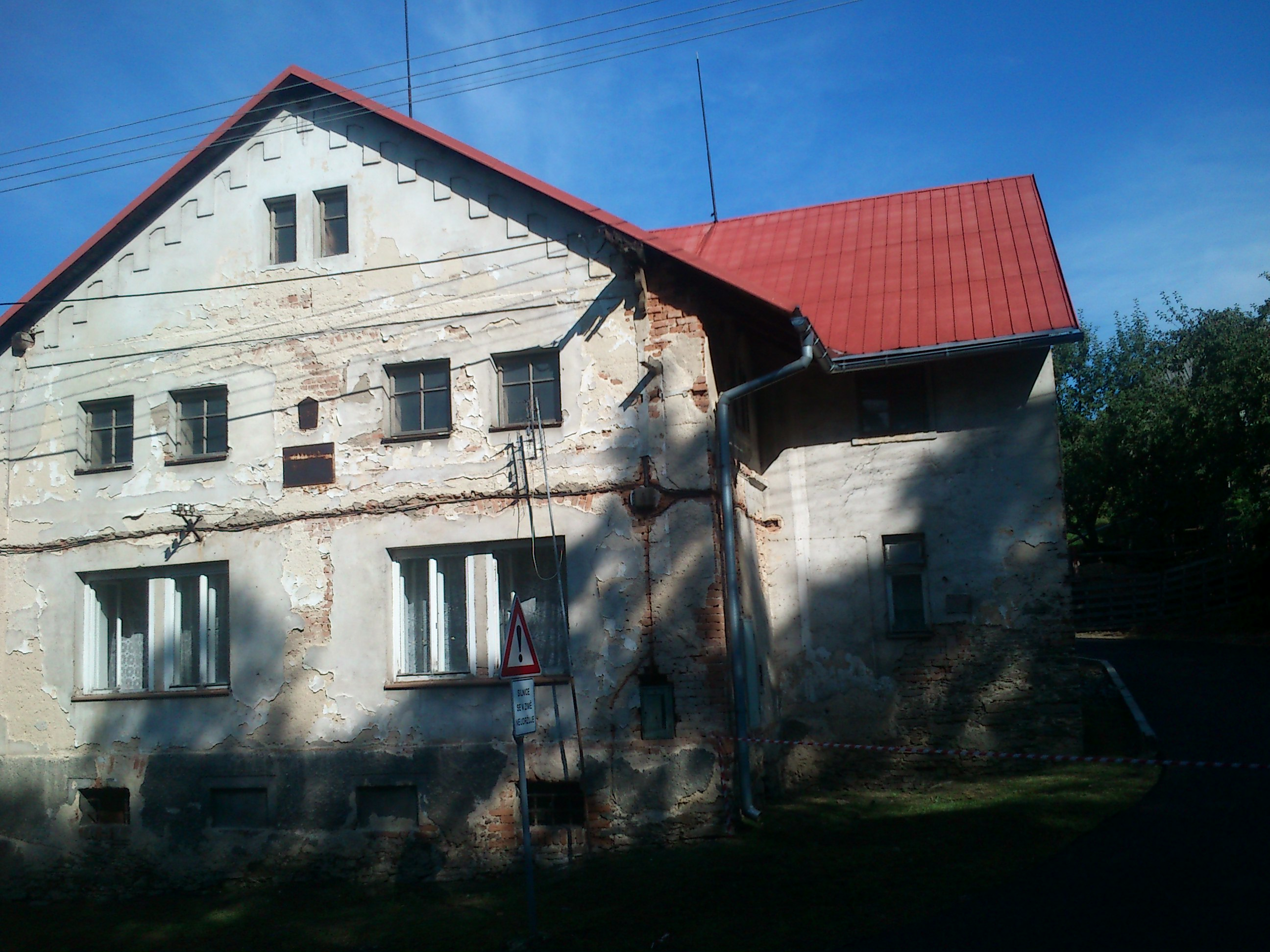 Budova školy v Mirotínku